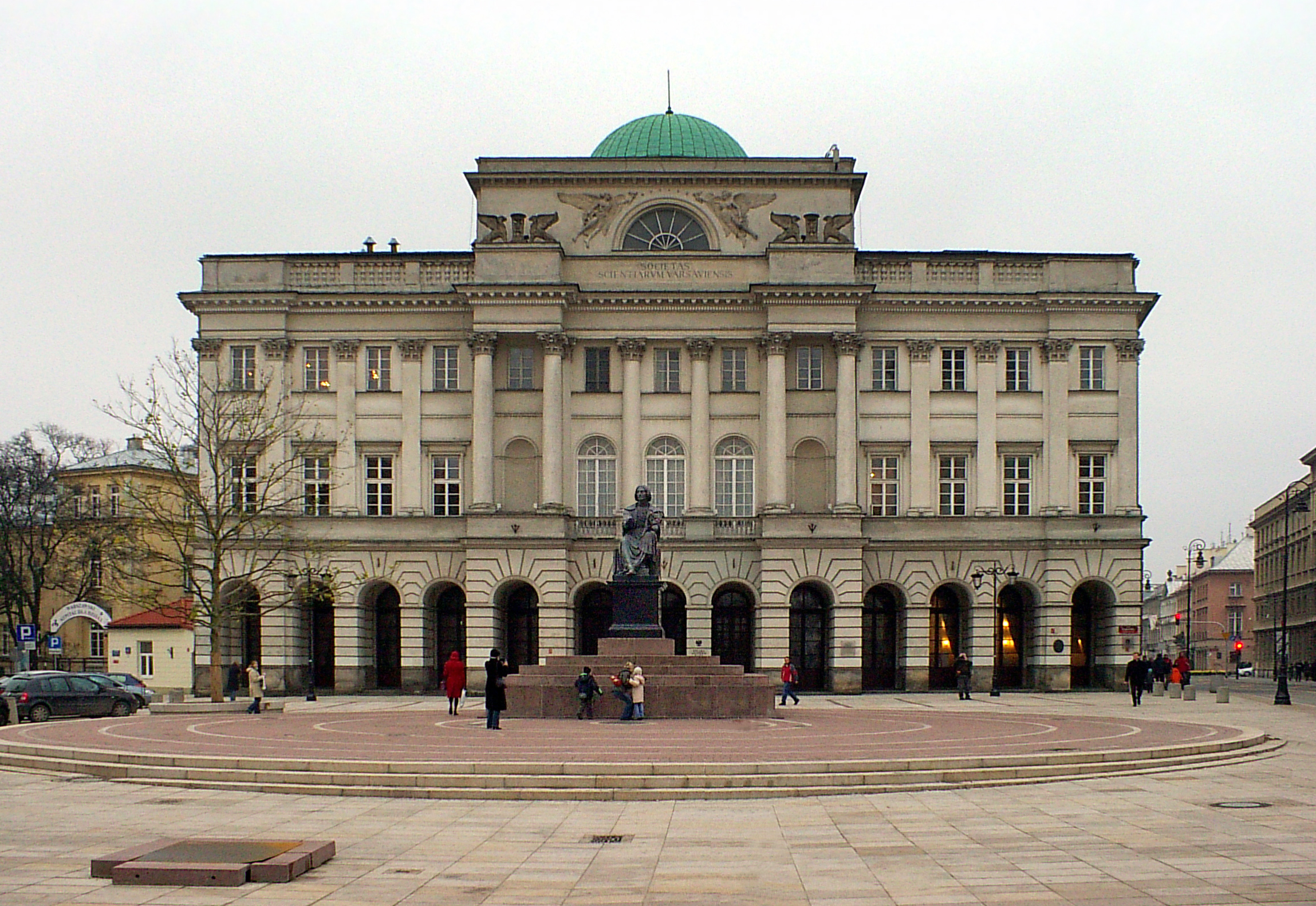 Pałac Staszica, Warszawa, Polska